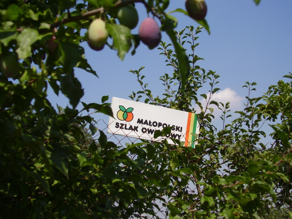 Tabliczka na Małopolskim Szlaku Owocowym w miejscowości Góra św. Jana